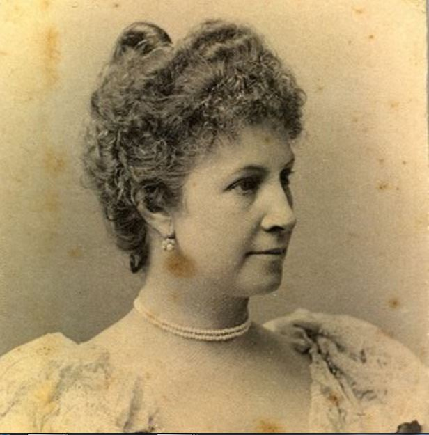 Grimanesa Martina Matto Usandivaras de Turner, más conocida como Clorinda Matto de Turner (Cuzco, Perú, 11 de septiembre de 1852-Buenos Aires, 25 de octubre de 1909) fue una destacada escritora peruana, precursora del género indigenista.